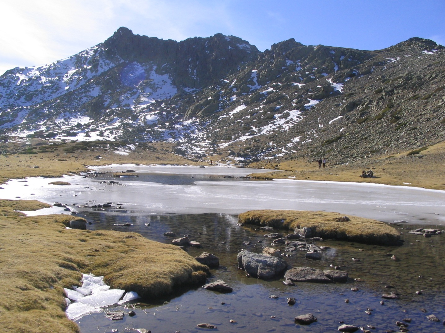 Imagen de la laguna de los Pájaros, situada en la zona norte del Parque Natural de Peñalara (Comunidad de Madrid, España) y a una altura de 2.169. Se asienta en una pradera relativamente llana ubicada al norte de los riscos de los Pájaros (2.334 m) y de los Claveles (2.388 m), dos de los picos de más difícil acceso del macizo de Peñalara, los cuales se aprecian en la imagen. A esta laguna se accede por un sendero de unos 5,5 km de longitud que sale del puerto de Cotos y que pasa por otras lagunas glaciares del parque natural. En la imagen, que está tomada en invierno, se aprecia que la laguna está parcialmente congelada. En este estado se encuentra desde diciembre hasta marzo, por lo que en ella solo habitan anfibios y no peces.